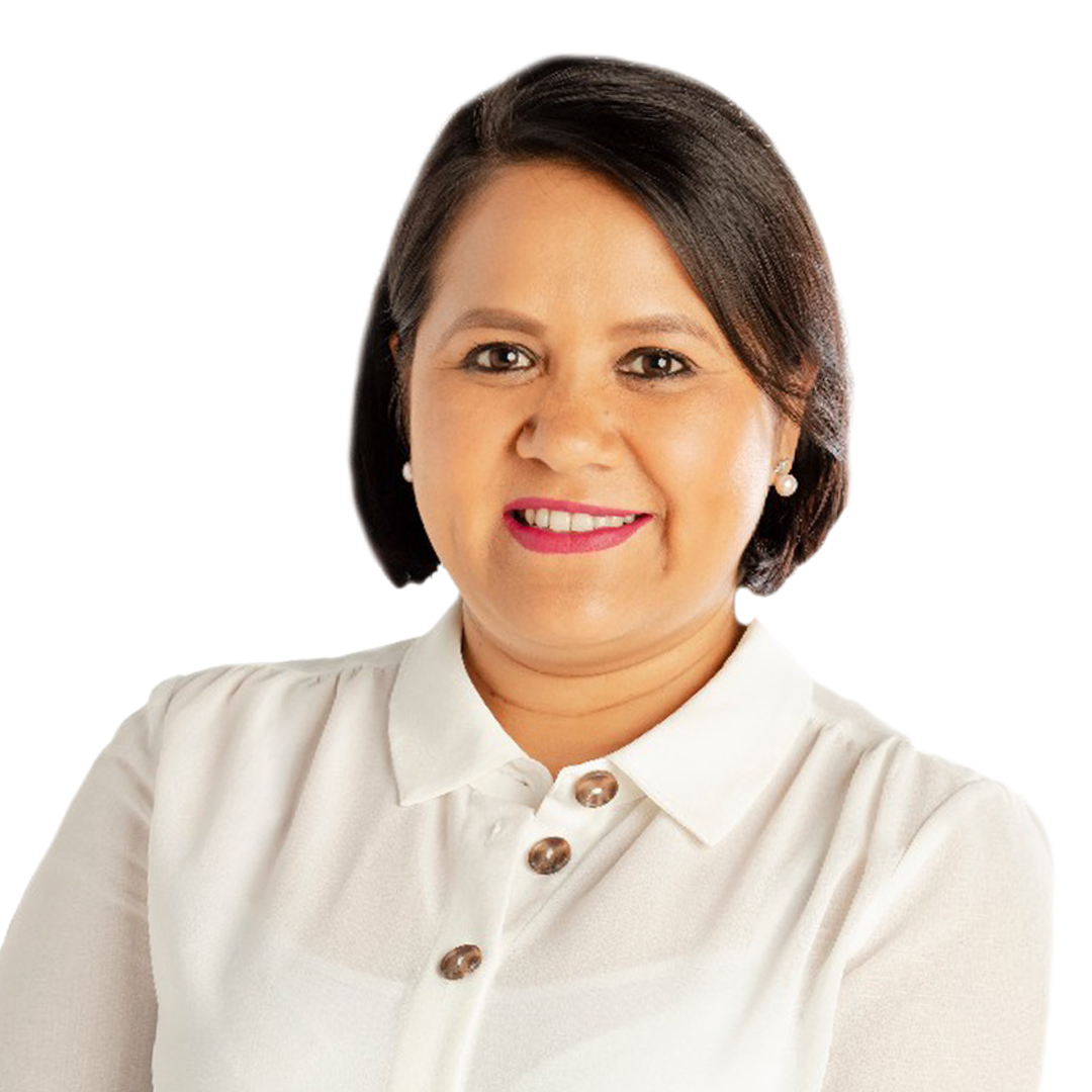 Cristina Cornejo